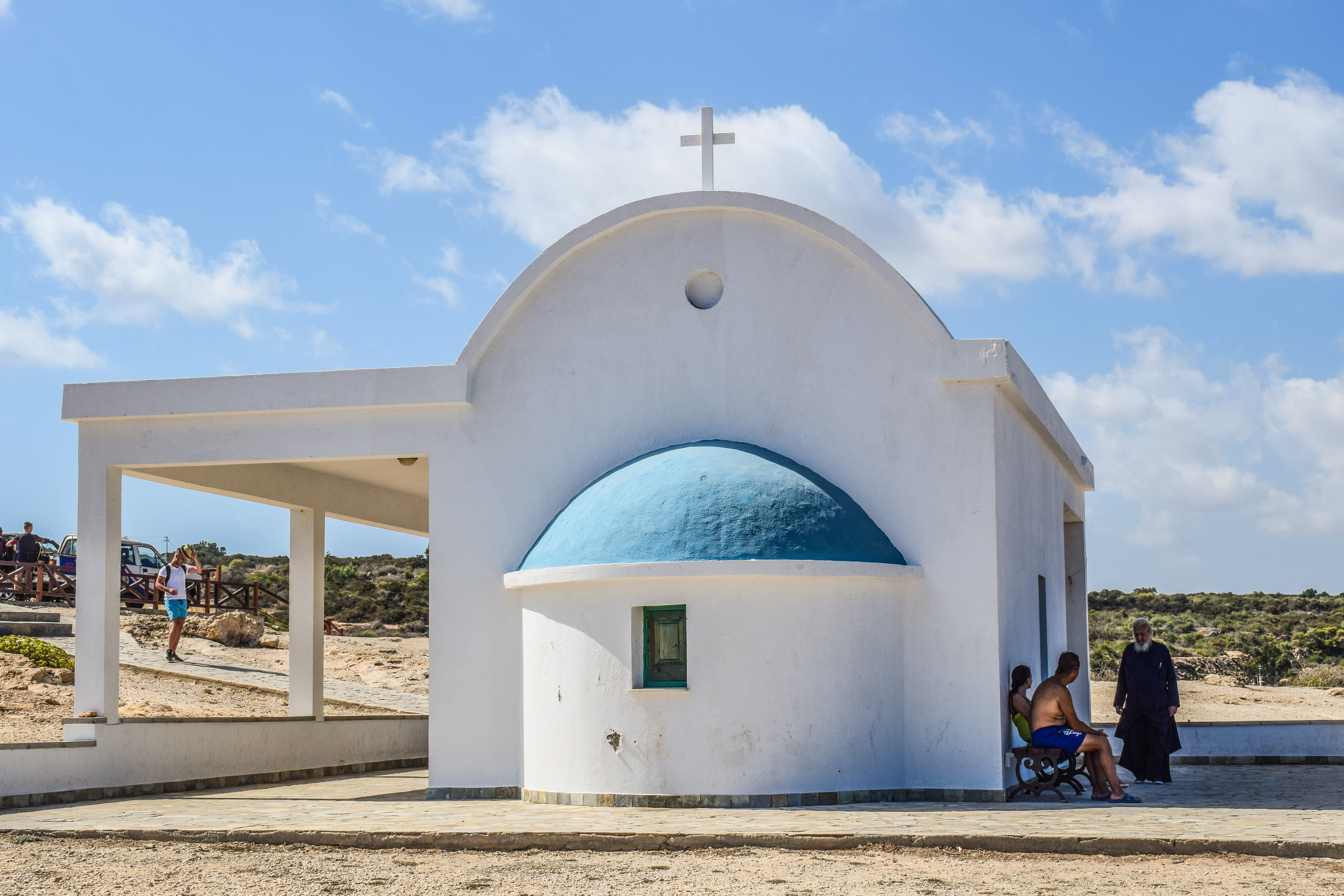 Saint's Anargyroi Chapel, Cape Greco